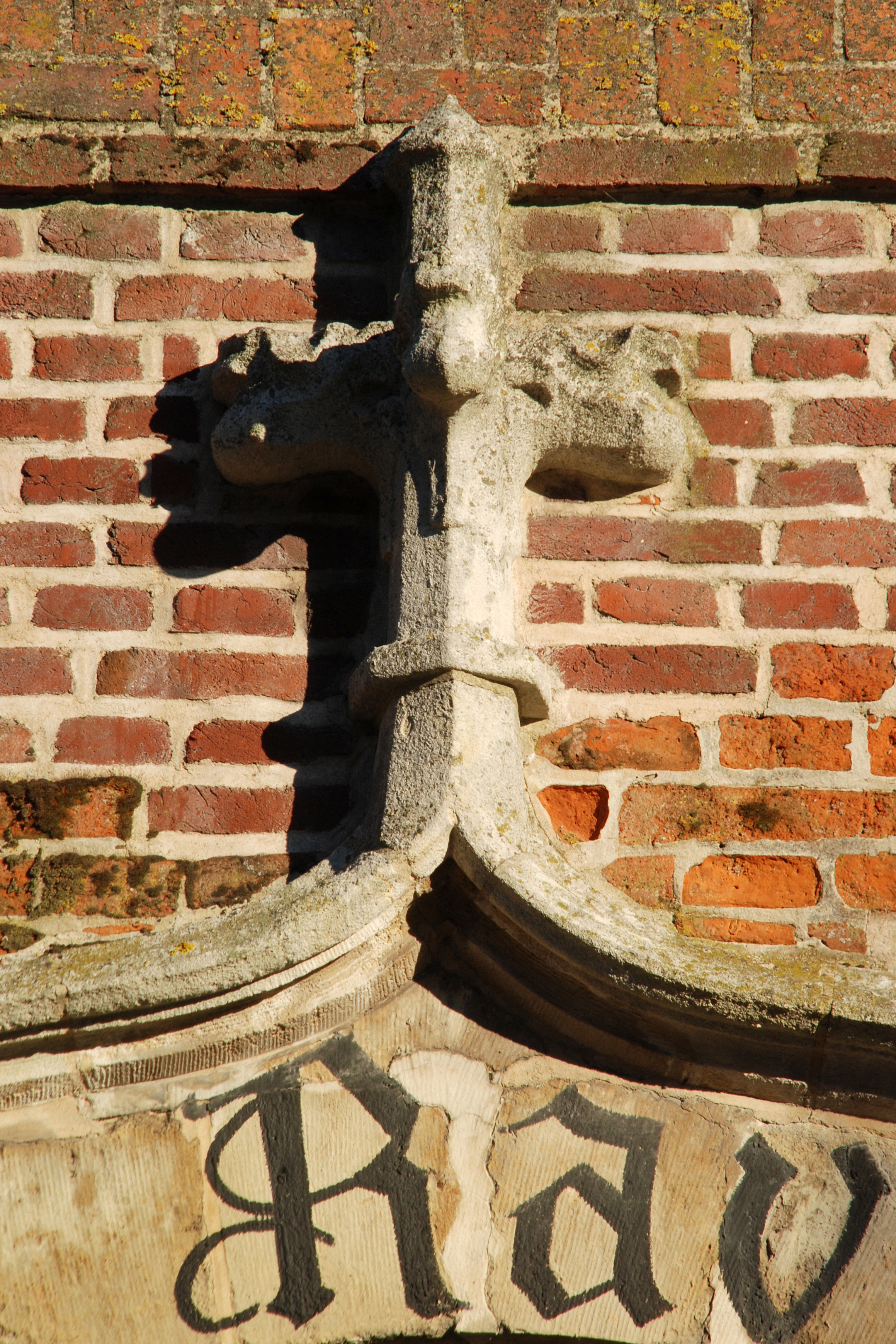 Belgique - Bruxelles - Hôtel Ravenstein